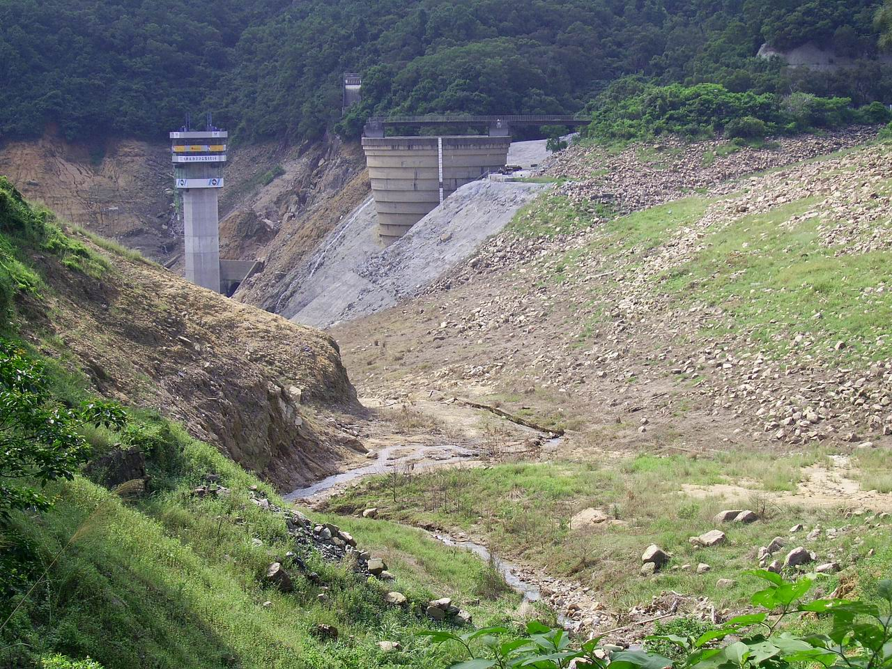 中文（香港）: 下城門水塘鐘形溢流口、鐵橋及新建的水制塔